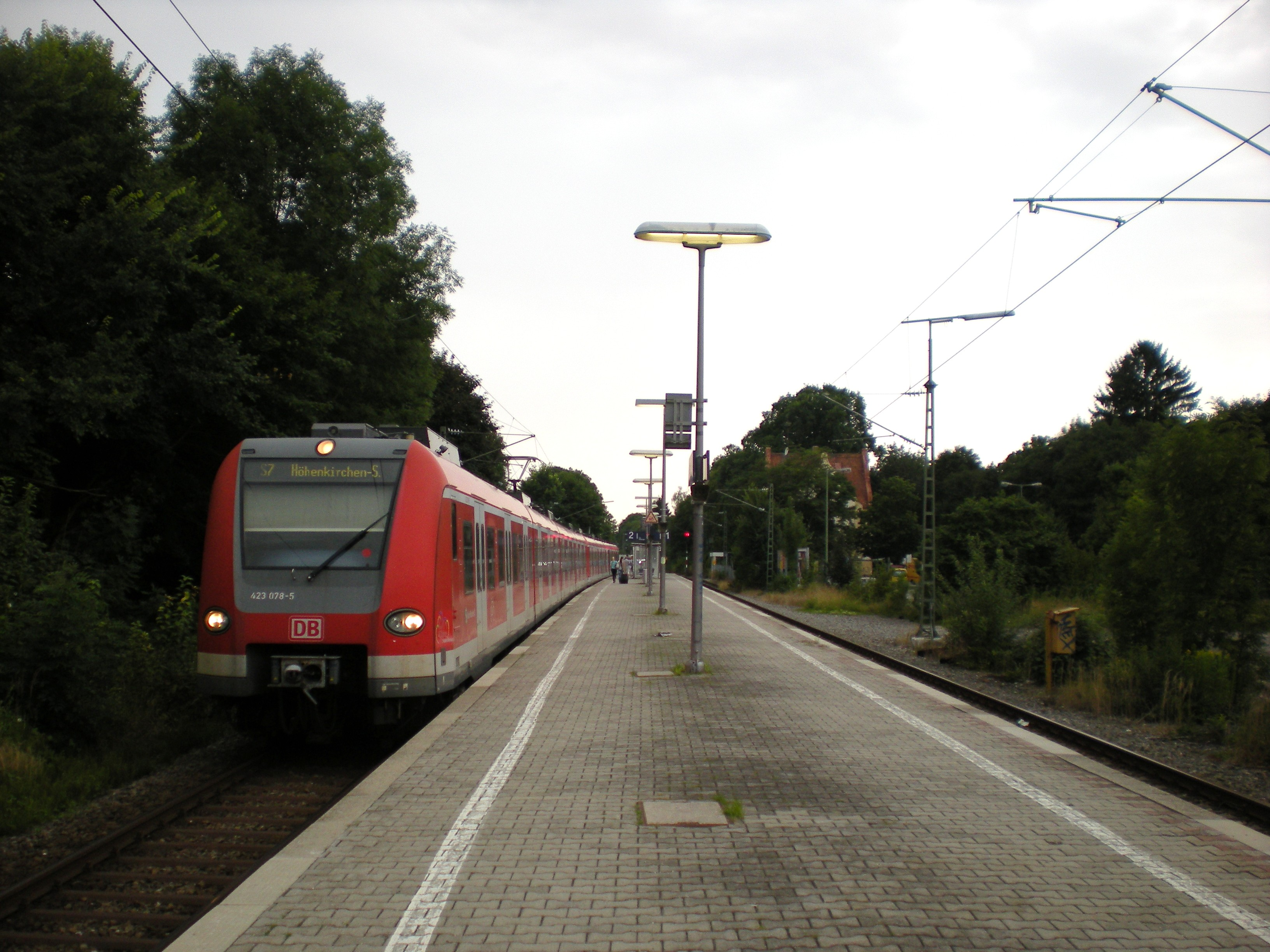 Mittelbahnsteig des S-Bahnhofs München-Perlach